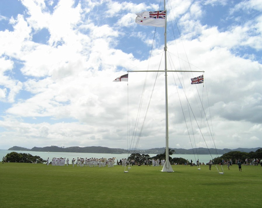 Waitangi Day celebration at Waitangi in 2006.